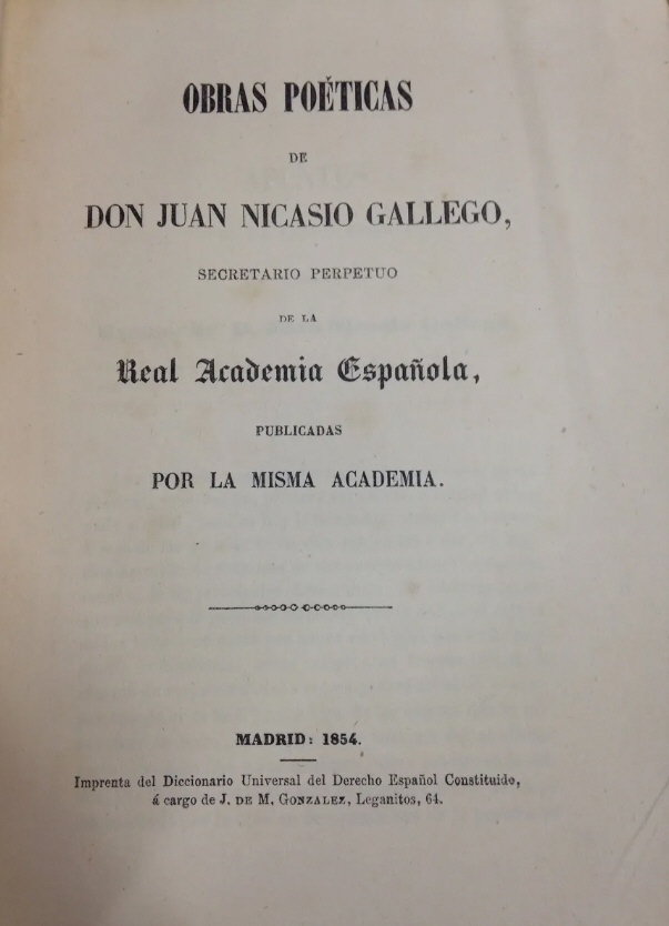 Titulní strana vydání Básnického díla Juana Nicasia Gallega z roku 1854